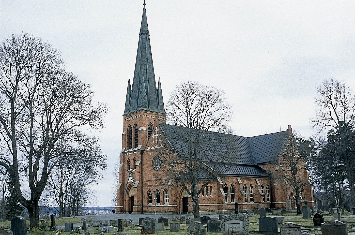 Guldsmedshyttans kyrka, exteriör.